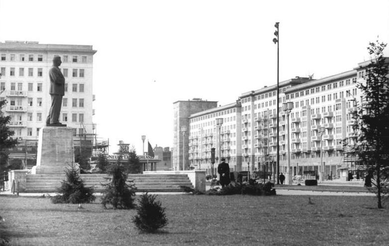 ADN-ZB-Weiß-Ms-Hö-9.4.1953 Die Bauten an der Stalinallee (später Karl-Marx-Allee)in Berlin.UBz: Links Block A-Süd, das Stalin-Denkmal, rechts Block A-Nord.